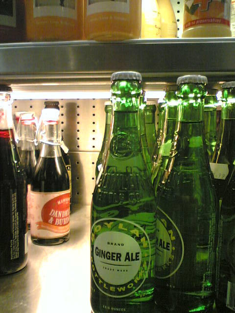 Selfridges